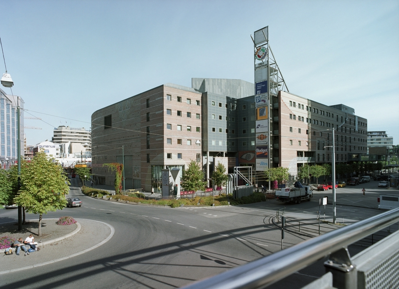 Oslo Spektrum